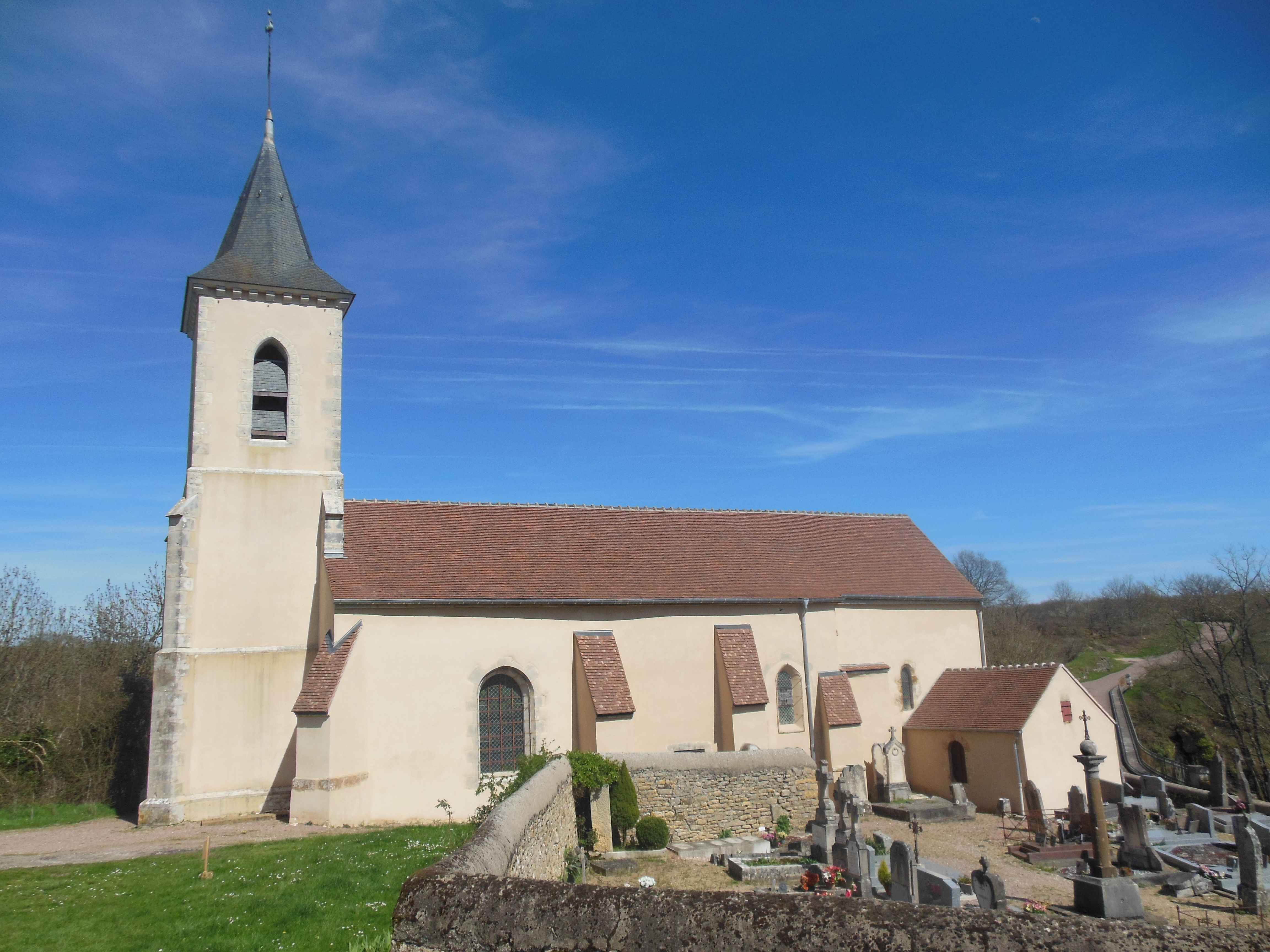 Photographie de l'église Saint-Léonard (clocher XIXe s), et du cimetière de Pierre-Perthuis (89).